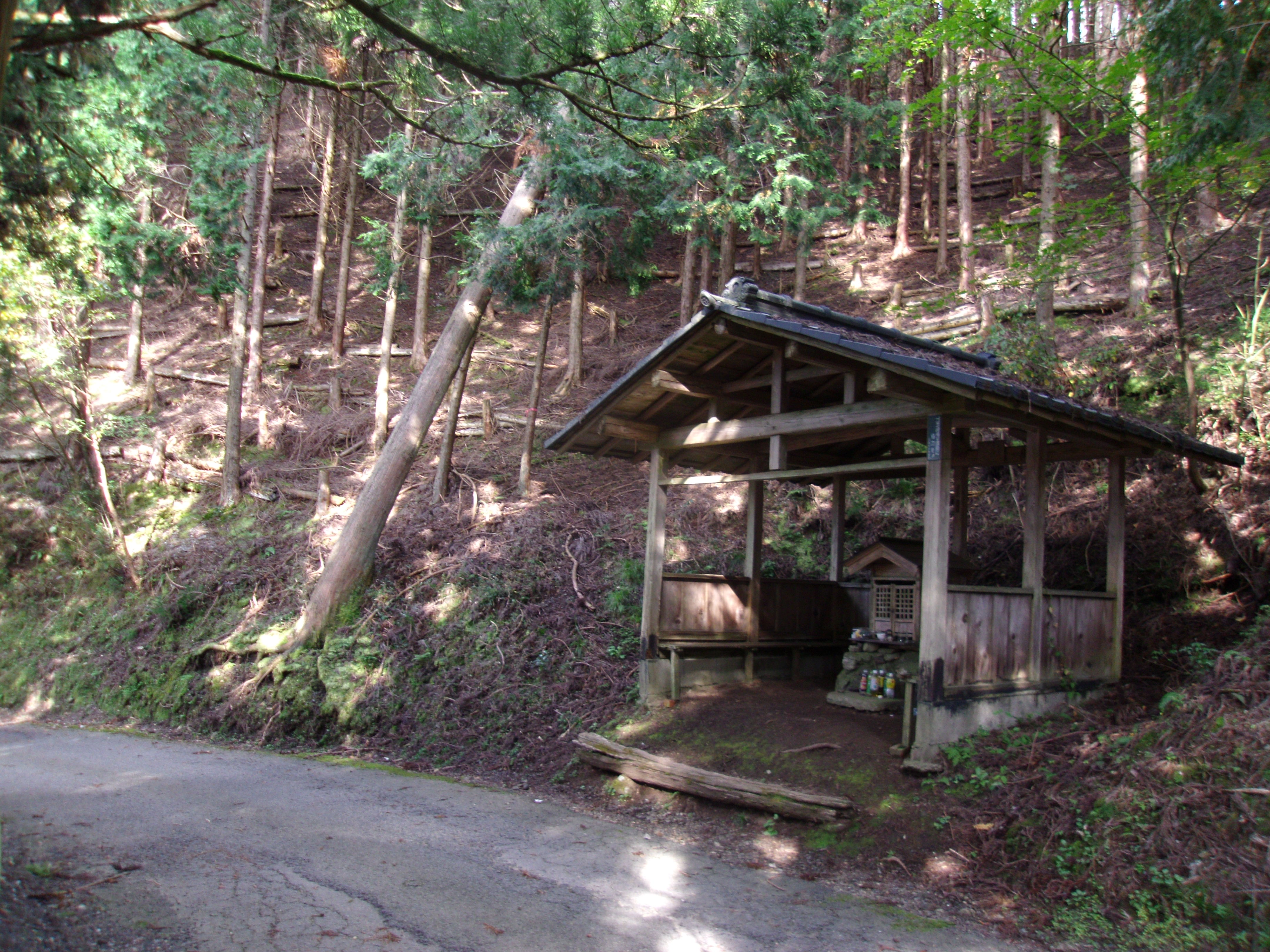 国道477号百井峠